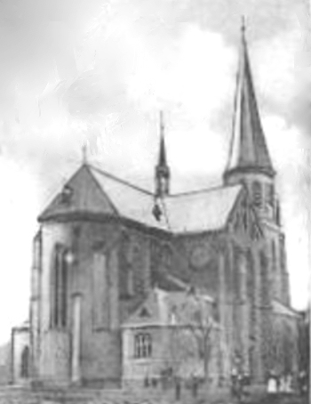 alte St. Antoniuskirche in Essen-Frohnhausen